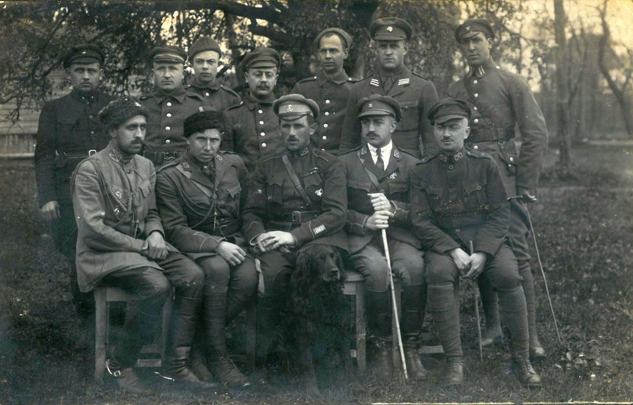 Беларуская (тарашкевіца): Генэрал-маёр Станіслаў Булак-Балаховіч з чынамі штабу ягонага атраду. Чаромха, 1920